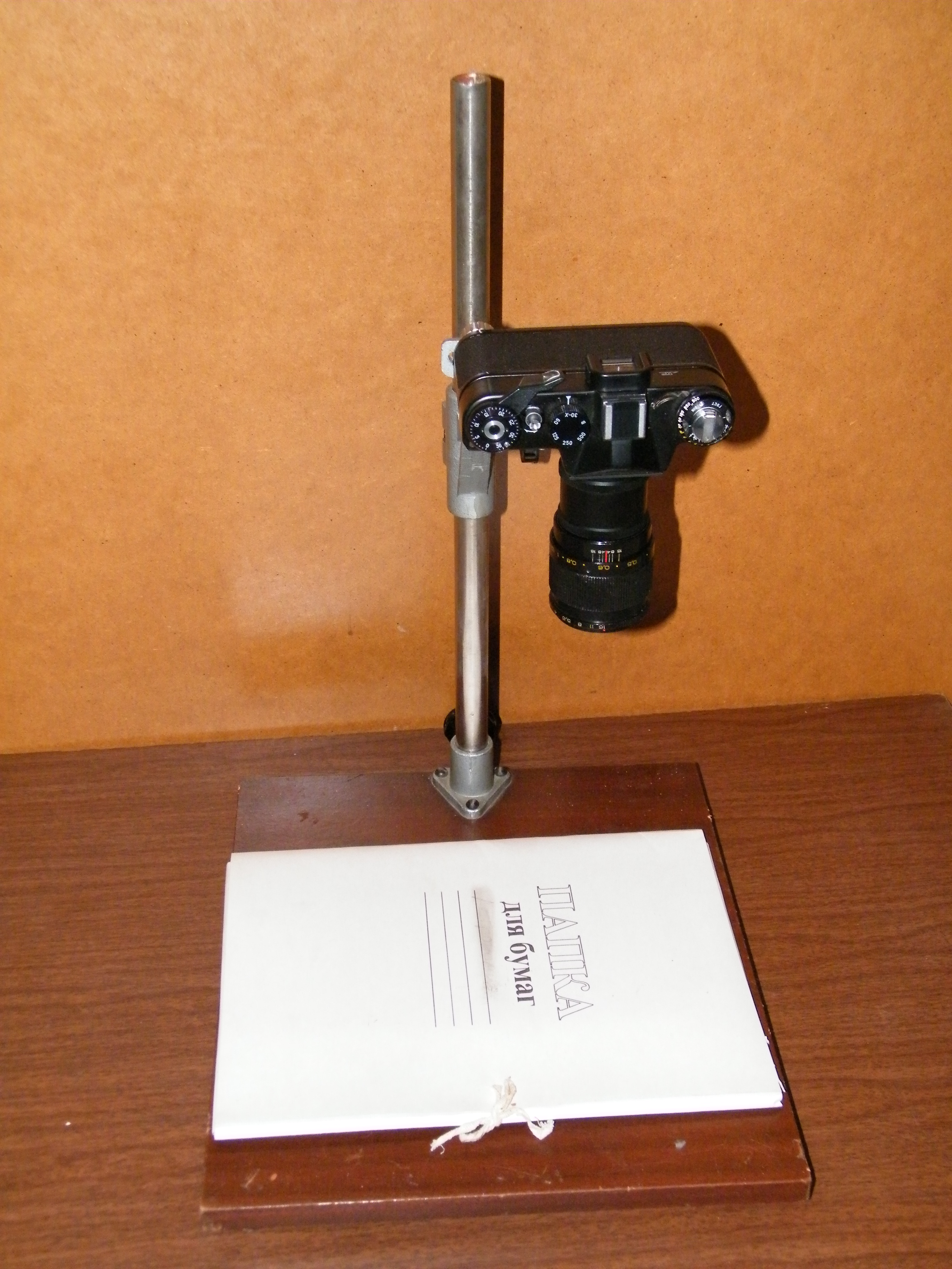 Самодельная репродукционная установка (фотоувеличитель "Юность") с фотоаппаратом "Зенит-ЕТ"